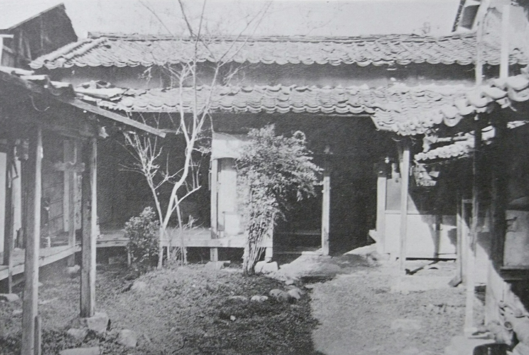 津山市の史跡「箕作阮甫旧宅」の解体復原工事前